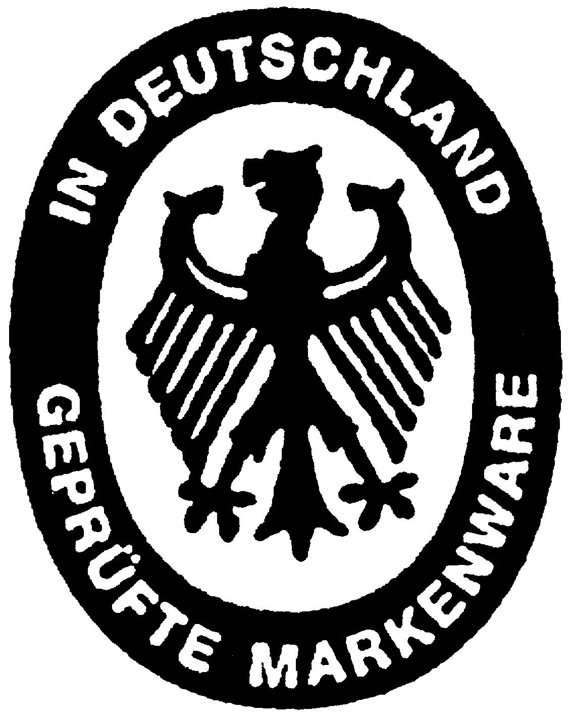 Gütezeichen für Markenbutter gem. § 13 Verordnung über Butter und andere Milchstreichfette (Butterverordnung); der Bundesadler auf Butterverpackungen wird umgangsspachlich auch "Butteradler" genannt